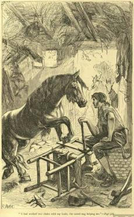 As Viagens de Gulliver, Parte IV, Capítulo X